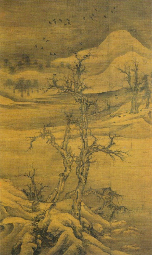 Corneilles dans de vieux arbres par le peintre chinois Luo Zhichuan, XVe siècle. Rouleau mural, encre et couleur sur soie, Dynastie des Yuan. Ses dimensions: 131,5x80 centimètres. Conservée à New York: (Metropolitan Museum of Art), (Acquisition, don en échange de J. Pierpont Morgan, 1973. 121.6).